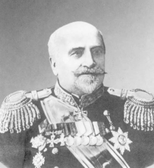 Батько Олександра Колчака Василь Іванович Колчак